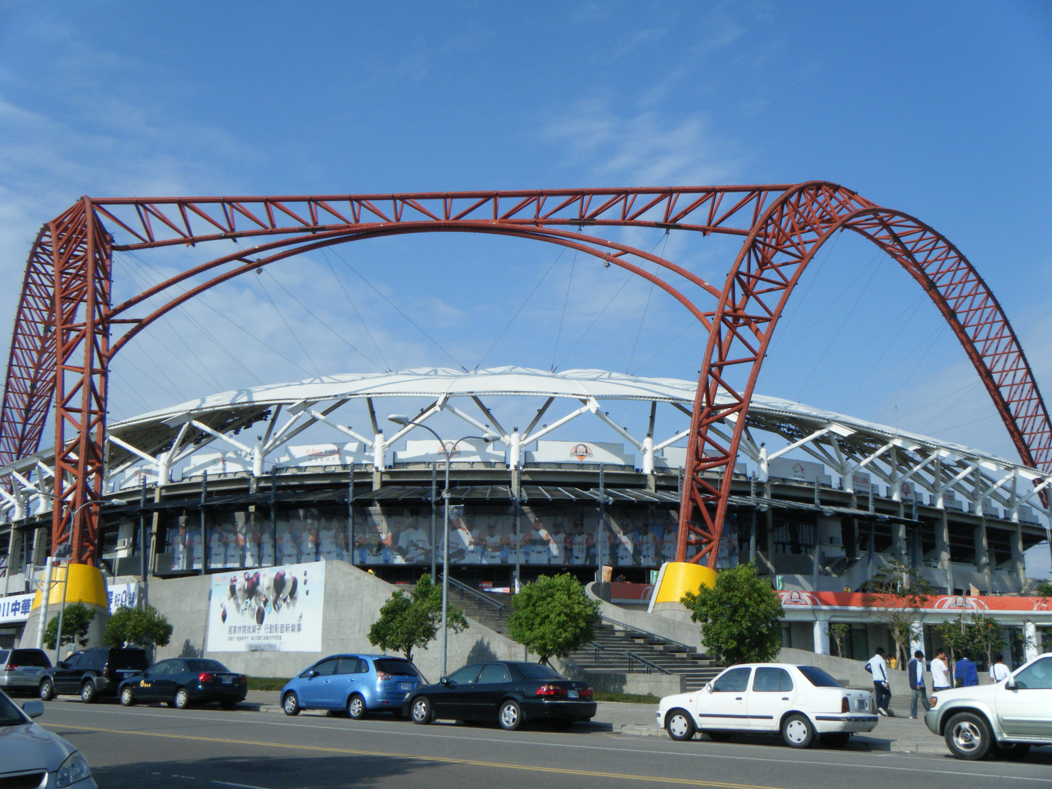 中文（台灣）: 台中洲際棒球場。